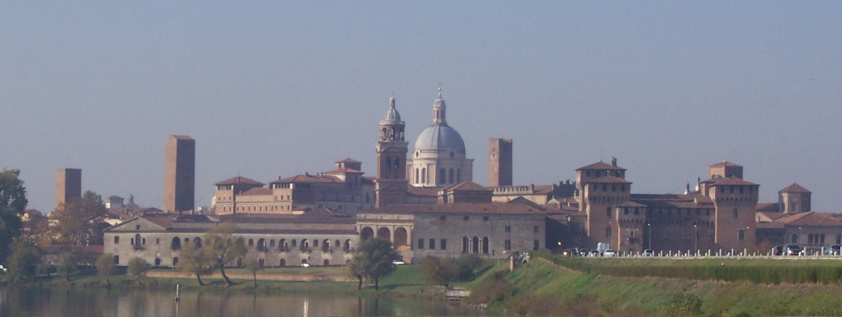 Panorama di Mantova